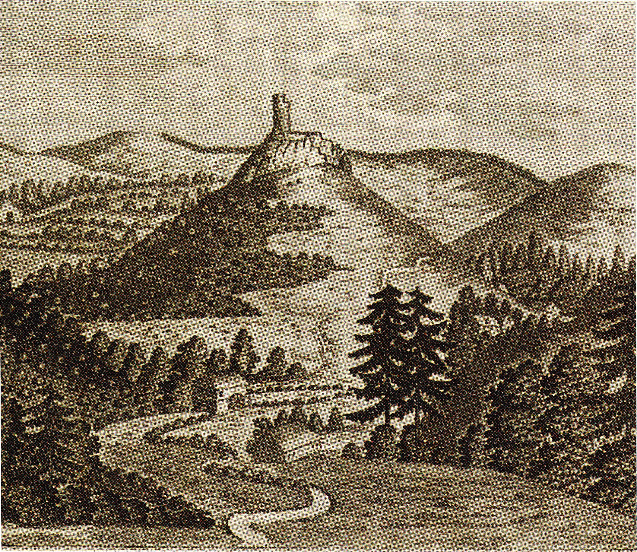 Stich der Burgruine Niesten aus dem Jahr 1855. Ausschnitt aus einer Radierung von Eustach Friederich, angefertigt nach einer Federzeichnung von Johann Kaspar Weinrauch ([1]).